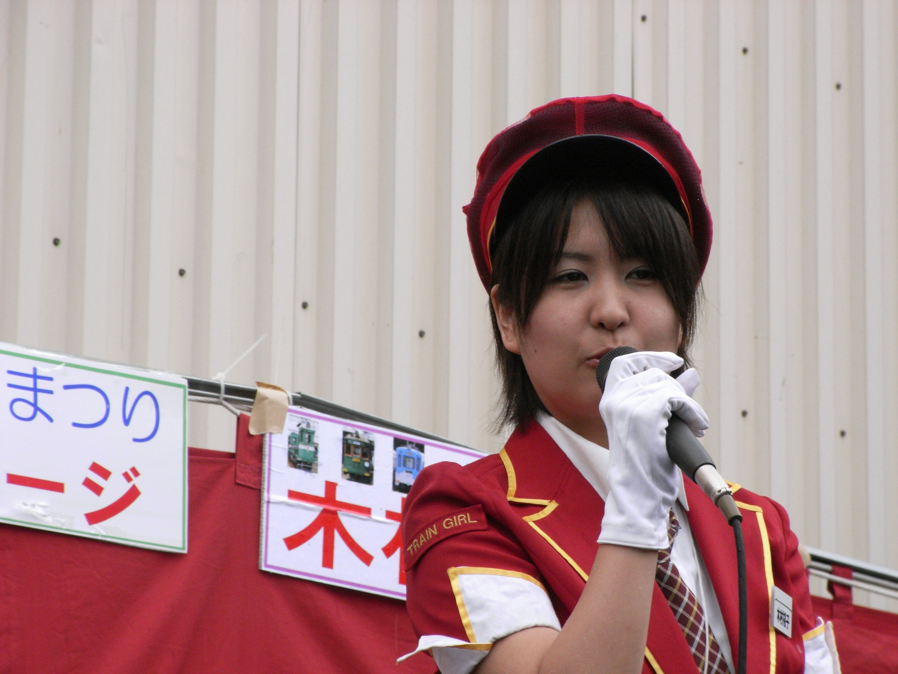 木村裕子 2007阪堺電車まつり（この時点では芸能事務所に所属していない）